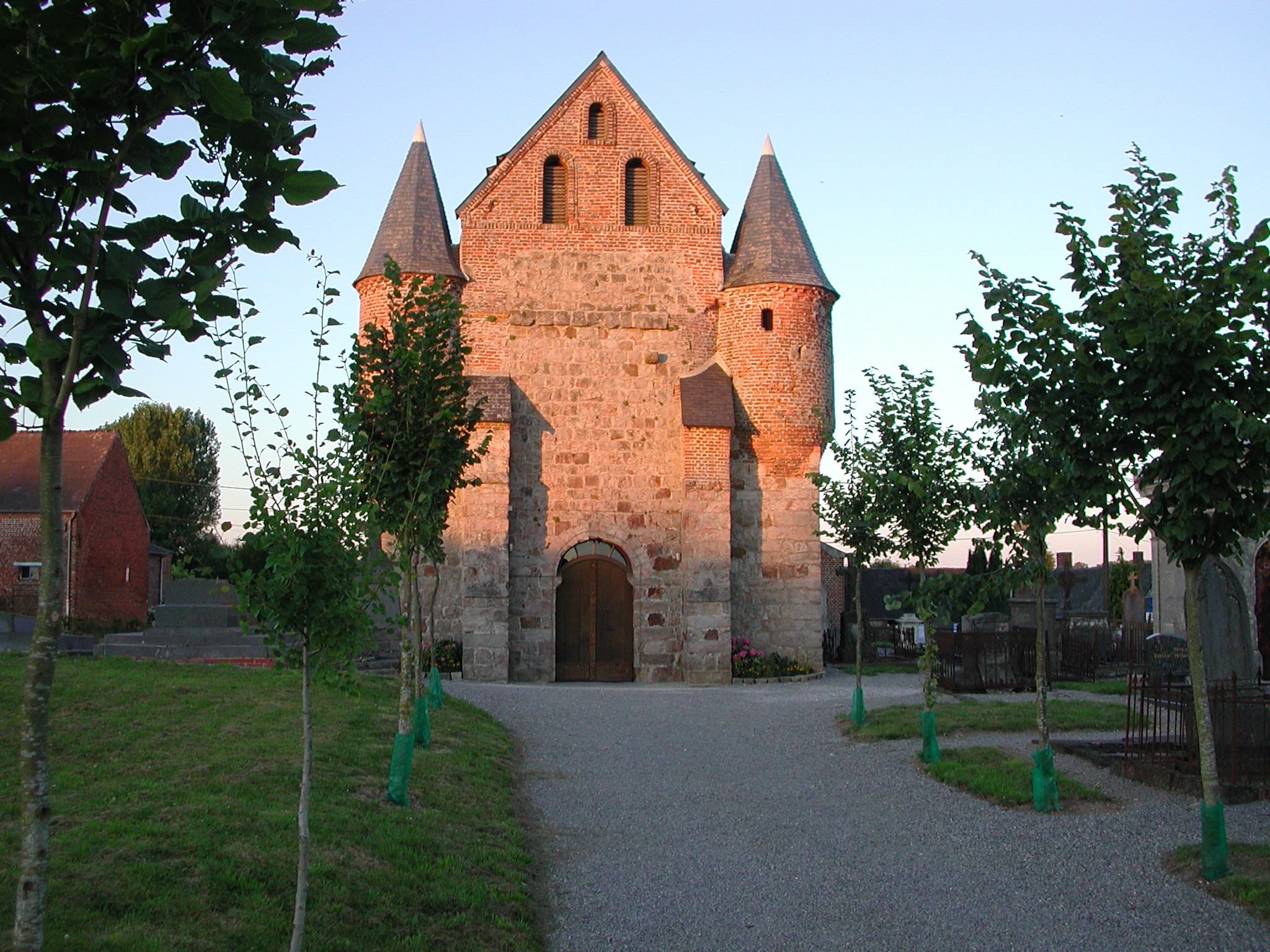 Eigen opname van de église fortifiée Saint-Nicolas te Englancourt (Aisne, France)